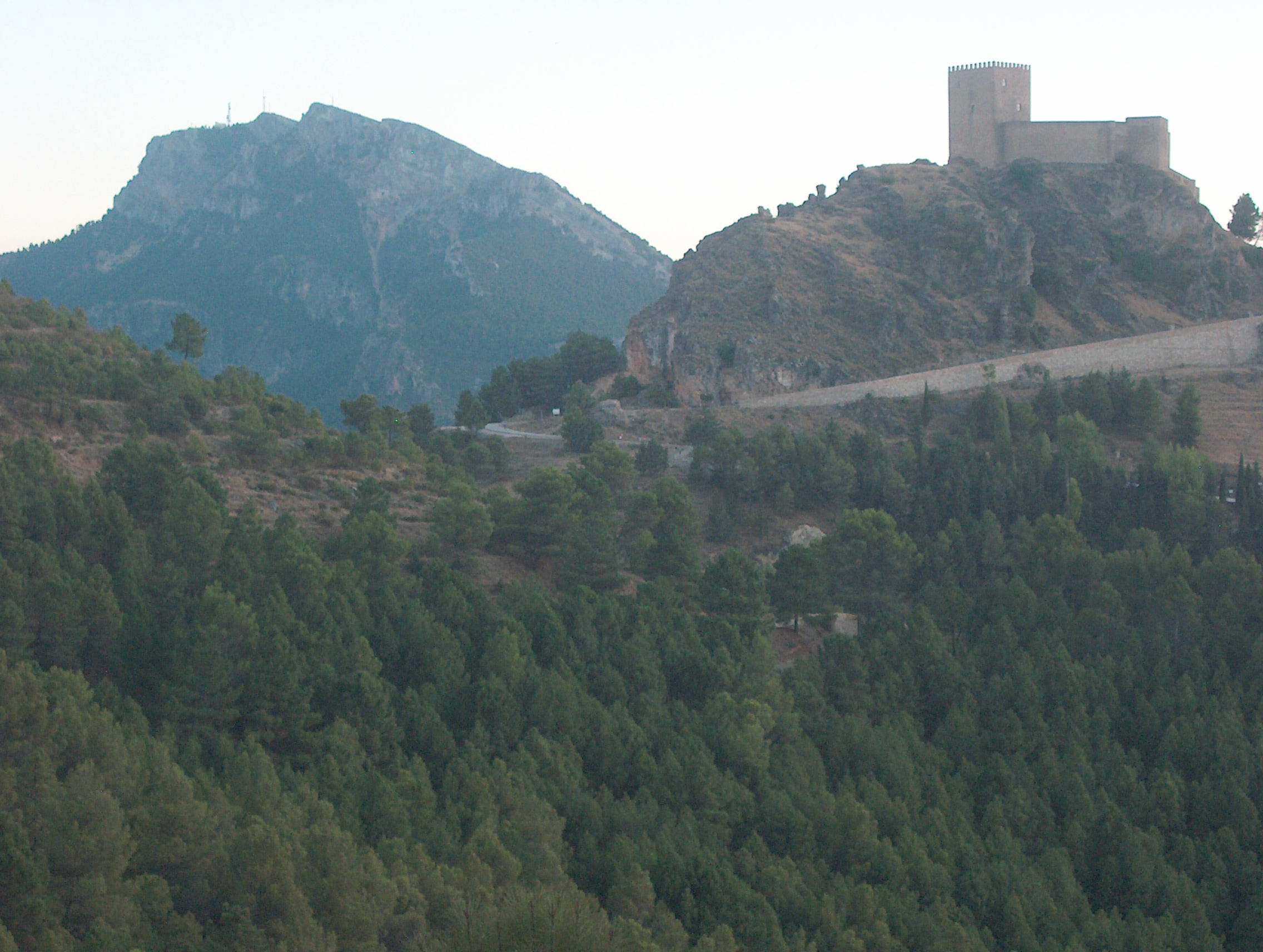 El Yelmo tras el castillo de Segura de la Sierra.